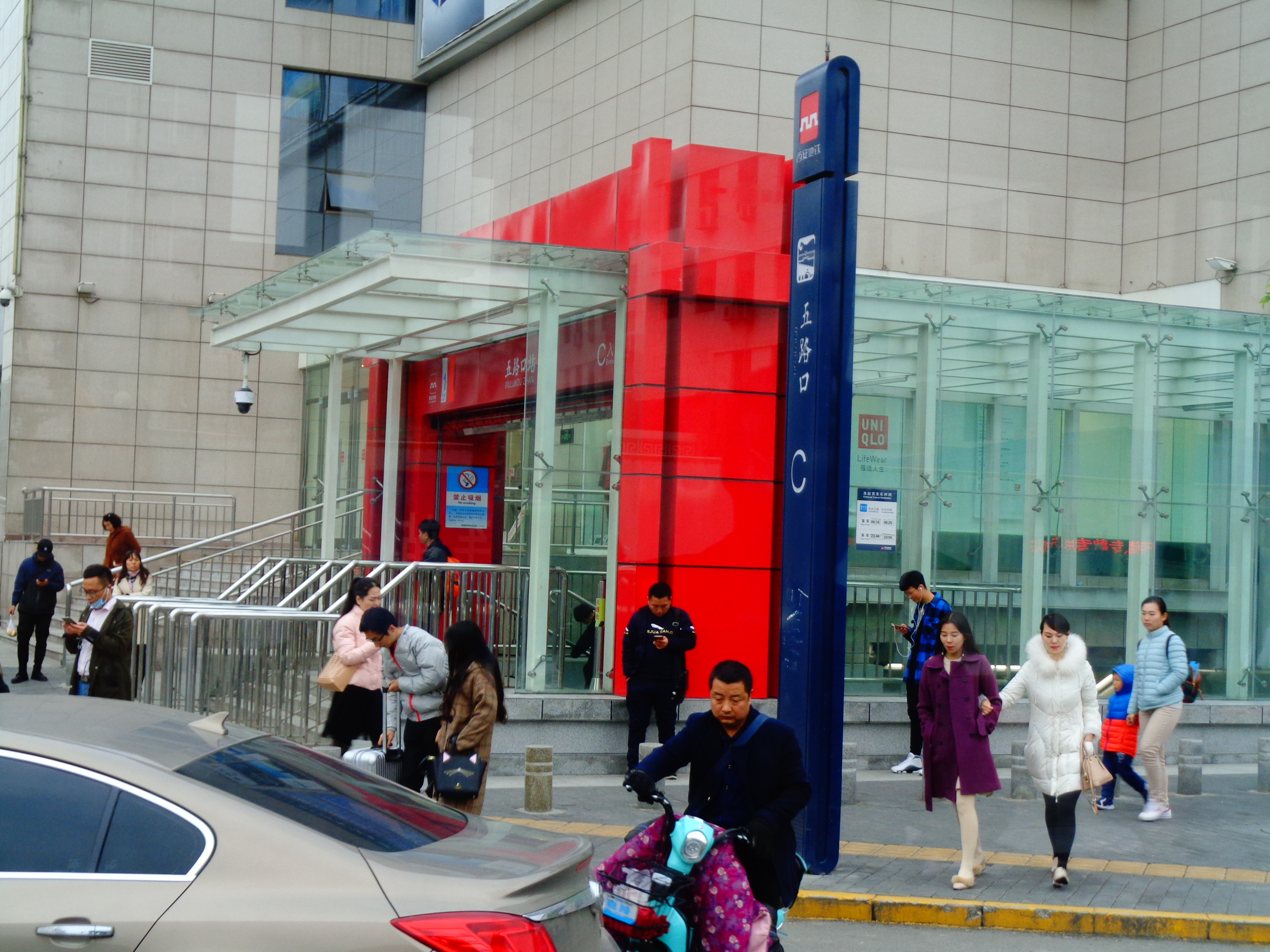 西安市新城区地铁五路口C口